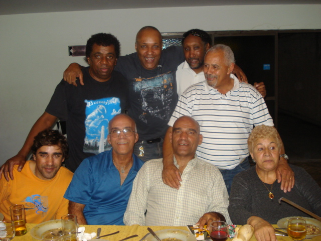 Familia.